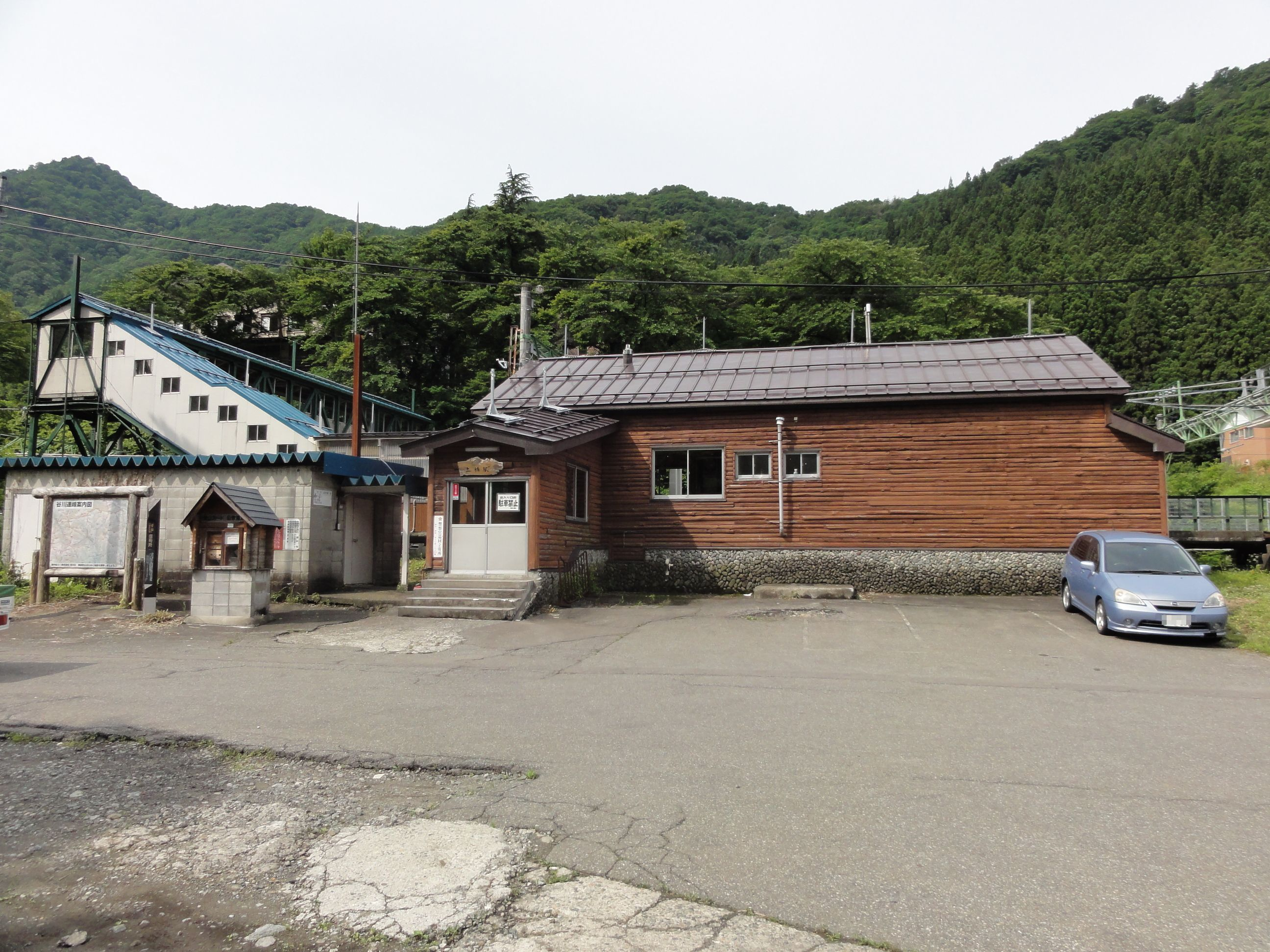 土樽駅